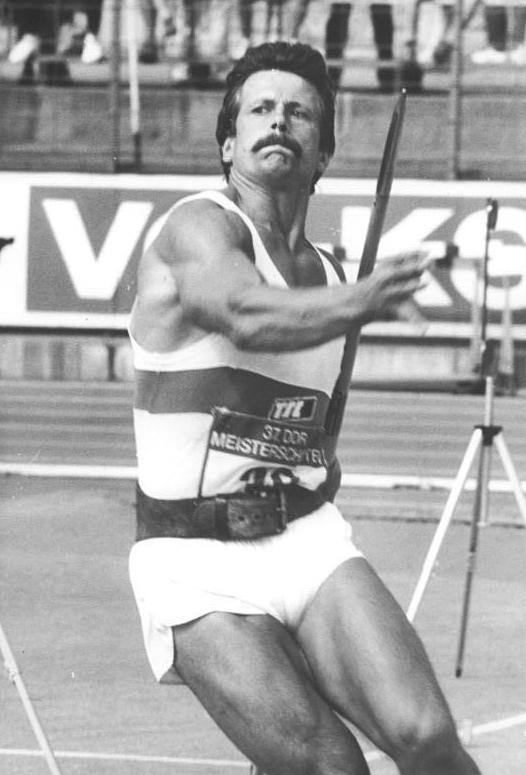 Detlef Michel ADN-ZB Kluge 29.6.86 Bez. Gera: DDR-Leichtathletik-Meisterschaften in Jena- Beim Speerwerfen siegte der Berliner TSC-Sportler Detlef Michel mit einer Weite von 82,84 m.